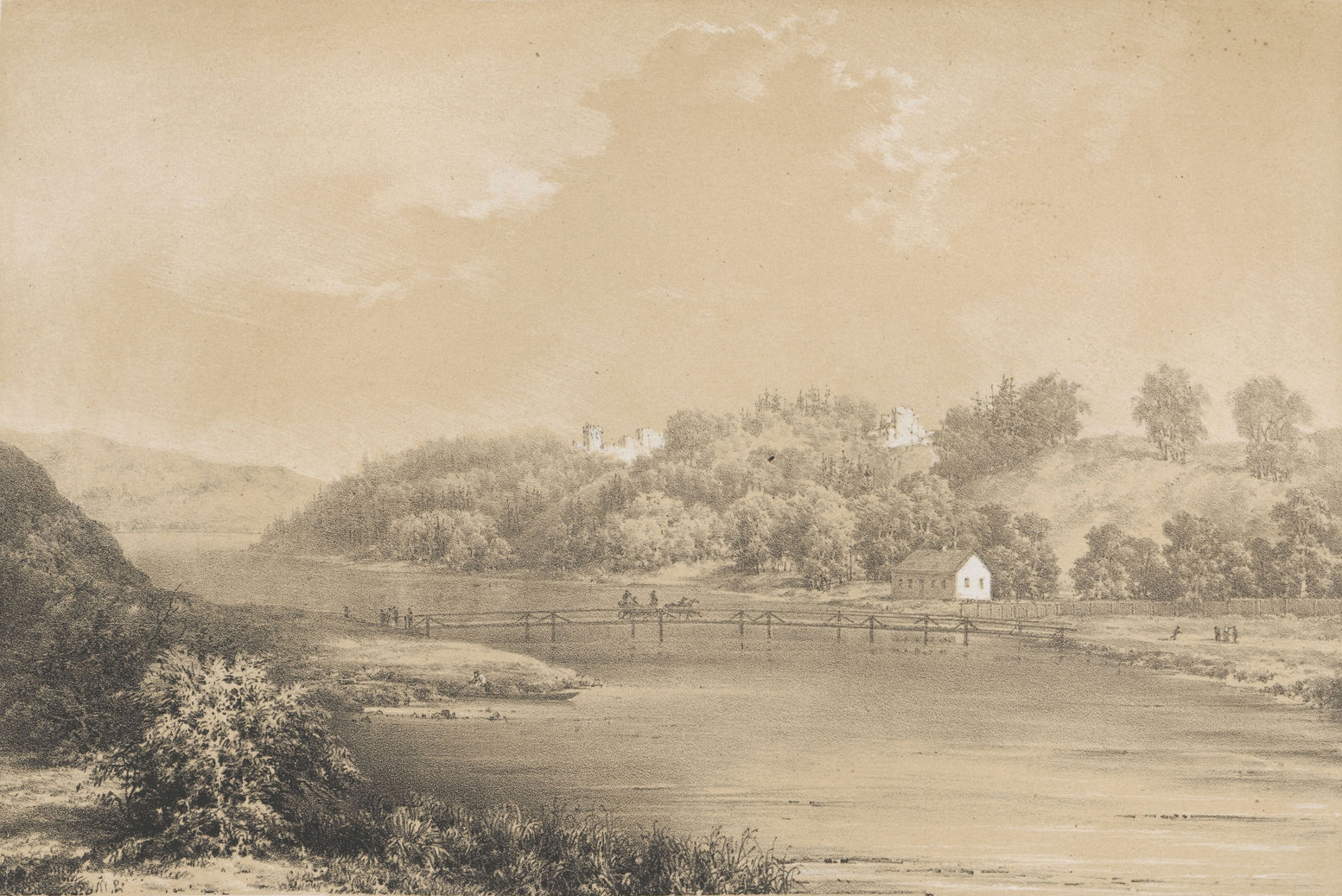 Беларуская (тарашкевіца): Дубінкі (Dubinki), возера Асьвея (Aśvieja)